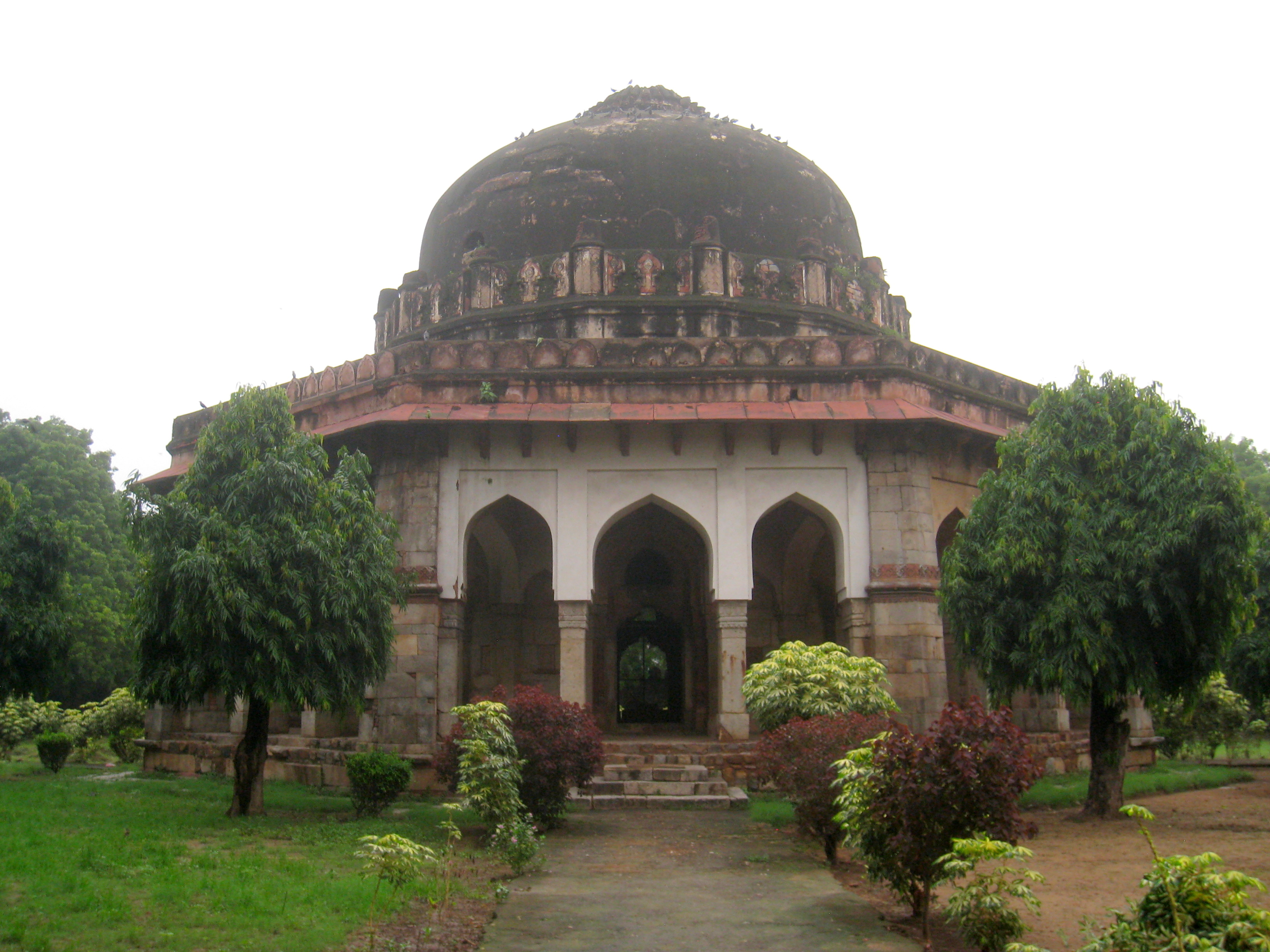 Sikander Lodi's Tomb, in Lodi Gardens at dawn, New Delhi, India.